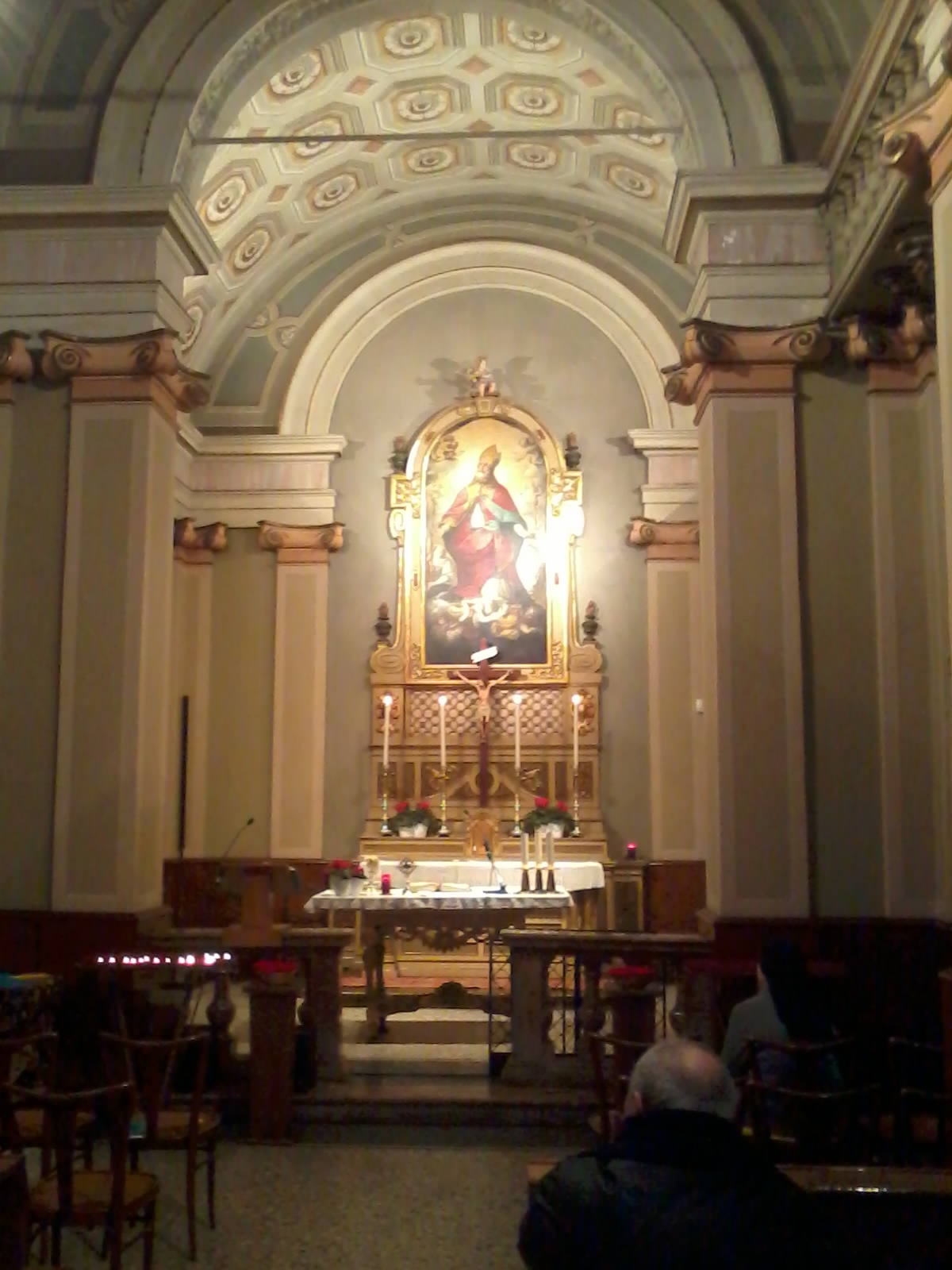 Oratorio di San Biagio a Magenta (MI), Italy